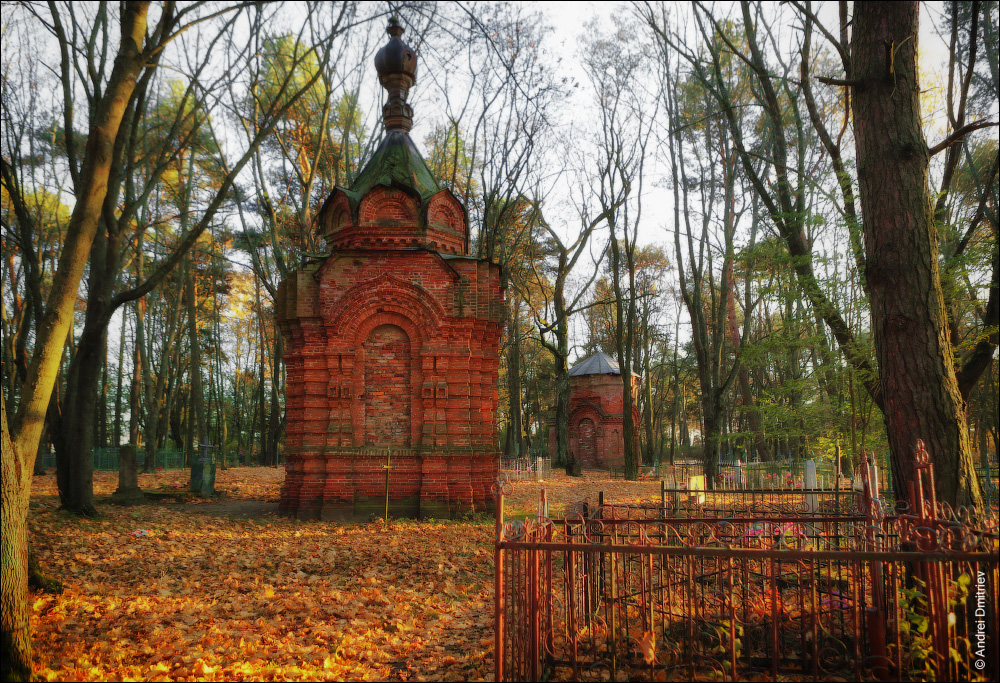 Рагачоўскія краявіды